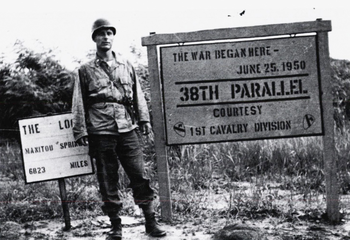 Kirurg Bernhard Paus|Bernhard Paus i Korea under Koreakrigen